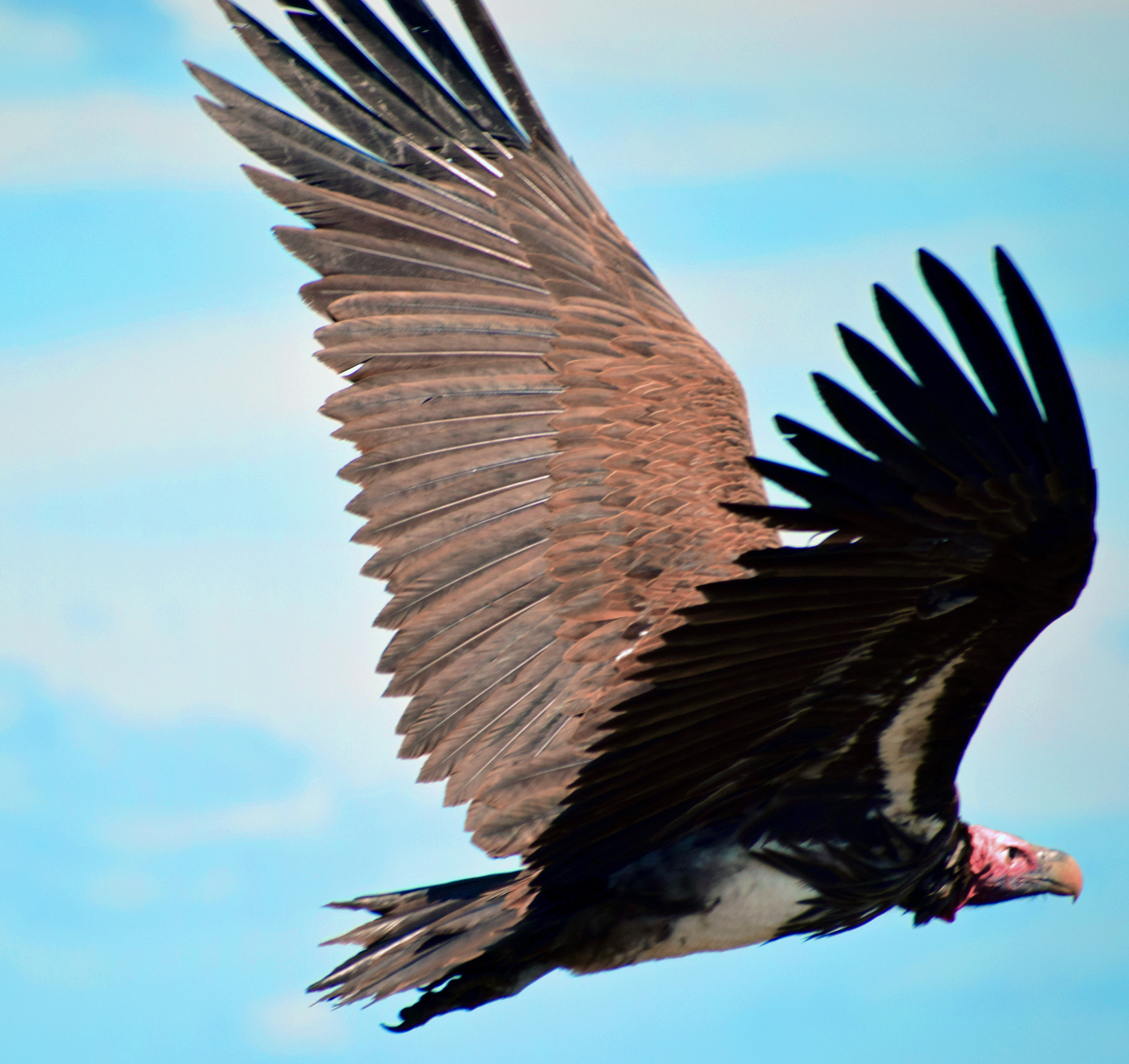 Torgos tracheliotos